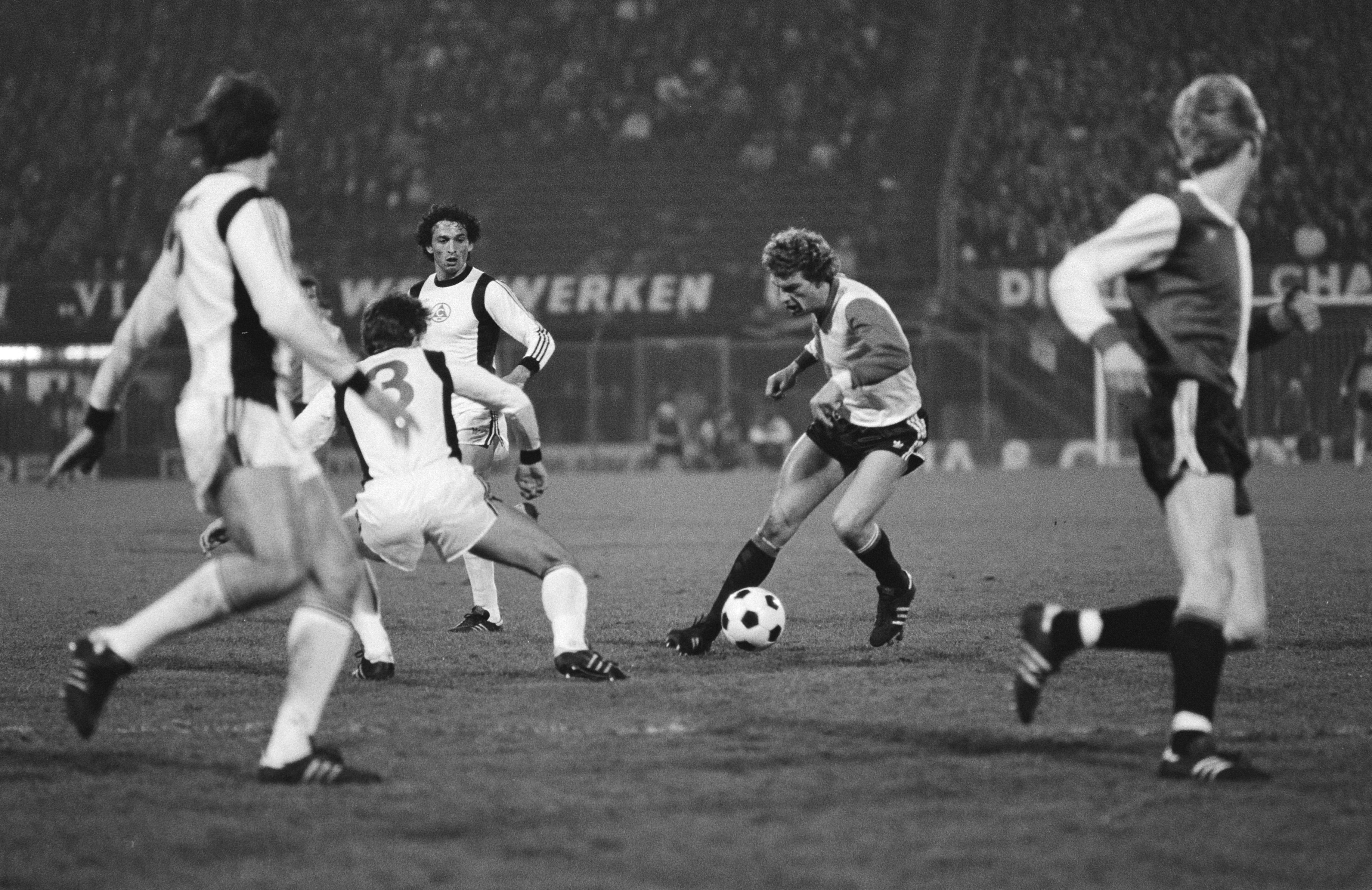 Collectie / Archief : Fotocollectie Anefo Reportage / Serie : [ onbekend ] Beschrijving : Voetbal, Feyenoord tegen Slavia Sofia (Europacup-II), spelmomenten Datum : 18 maart 1981 Trefwoorden : sport, voetbal Instellingsnaam : Europa Cup, Feyenoord, Slavia Sofia Fotograaf : Dijk, Hans van / Anefo Auteursrechthebbende : Nationaal Archief Materiaalsoort : Negatief (zwart/wit) Nummer archiefinventaris : bekijk toegang 2.24.01.05 Bestanddeelnummer : 931-3796